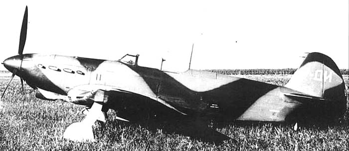 Yakovlev Yak-7DI, Soviet prototype long range fighter